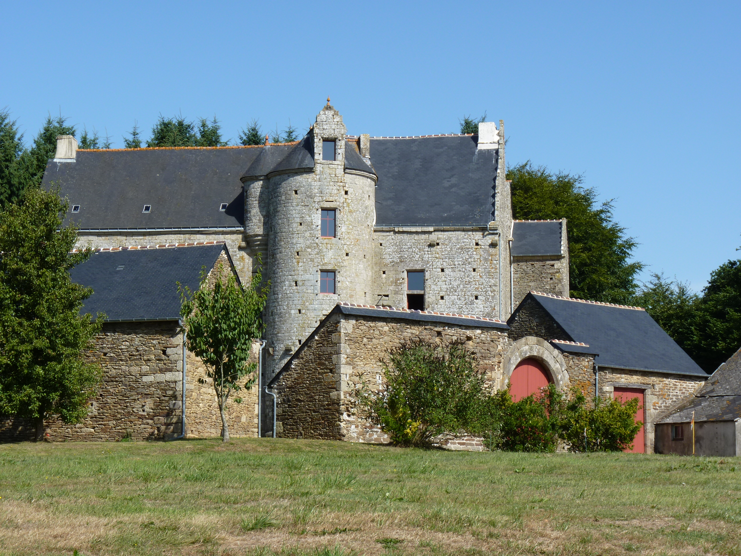 Manoir du 16ème siècle.